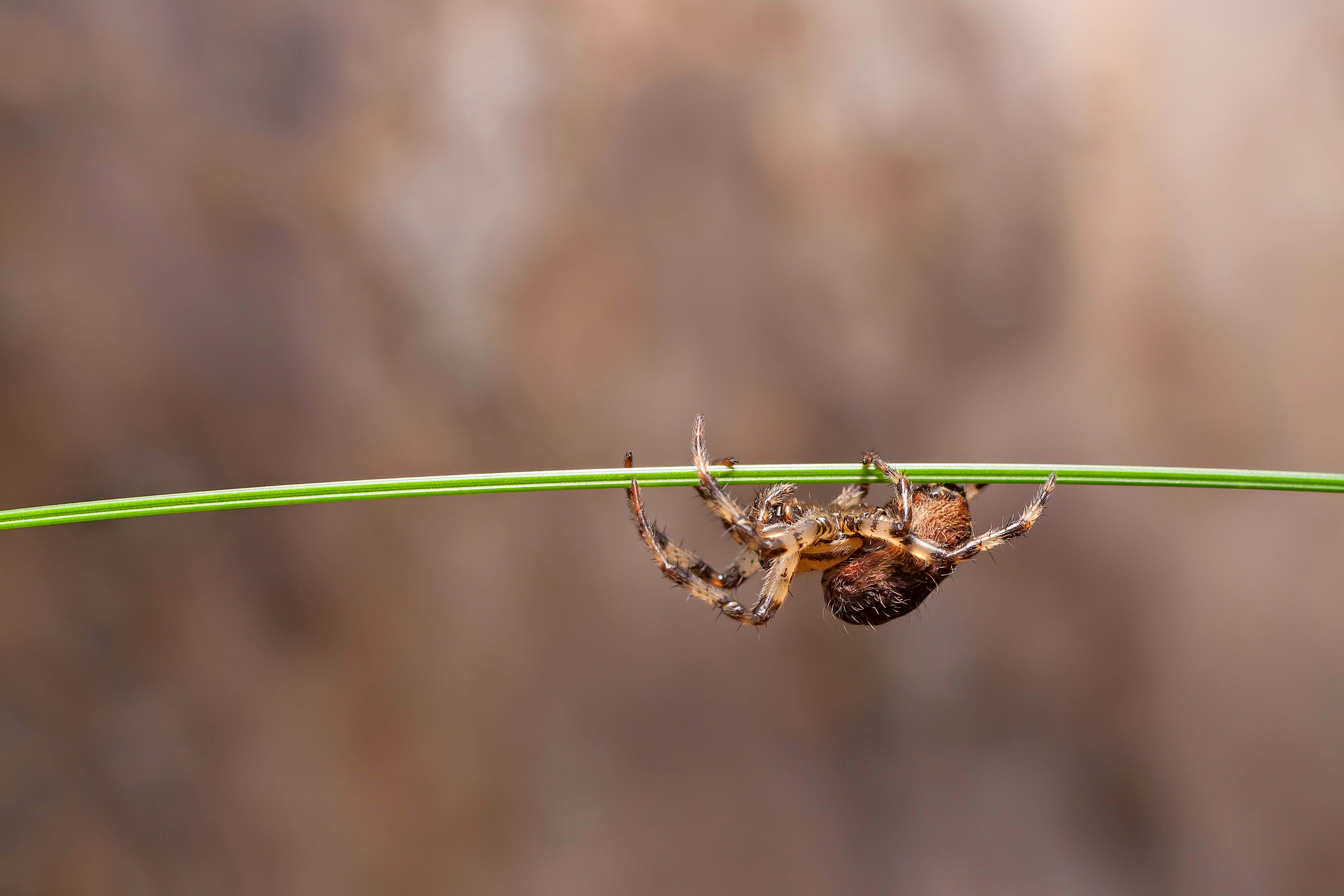 Ristiämblik elutseb peamiselt aedades ning metsades. Aiad sobivad nende elupaigaks kõige paremini, sest seal on taimede mitmekesisus tavaliselt küllalt suur ning seega elutseb seal mitmeid putukaid, millest nad toituvad. Tema leviala on tohutult suur, kliimatingimused teda eriti ei mõjuta, muidugi eelistab ta sooje ilmu aga elab üle ka külmad talved. Risriämblikule on omane pruun keha, kollakad pruunid jalad, mida kaunistavad kaldu olevad ringid. Värvuselt kõiguvad nad kollase ja tume halli vahel. Ristiämbliku seljal moodustub viiest või enamast valgest täpist ristikujuline märk. Tema hammustus on inimesele küllaltki kahjutu, mõningal juhul võib tekkida sügelus ja kerge paiste, seda võib võrrelda mesilase nõelamisega. Isane ristiämblik on tunduvalt väiksem kui emane. Emane kasvab tavaliselt 6,5-20 mm suuruseks ja isane 5,5-13 mm suuruseks. Paaritumisel peab isane emasele väga aeglaselt lähenema, kuna ettevaatamatus võib põhjustada selle, et emane sööb isase ära. Peale munemist sureb emane ära. Väiksed ilmale tulnud ristiämblikud püsivad tavaliselt koos ühes grupis, kuni nad on piisavalt suured, et ise hakkama saada.